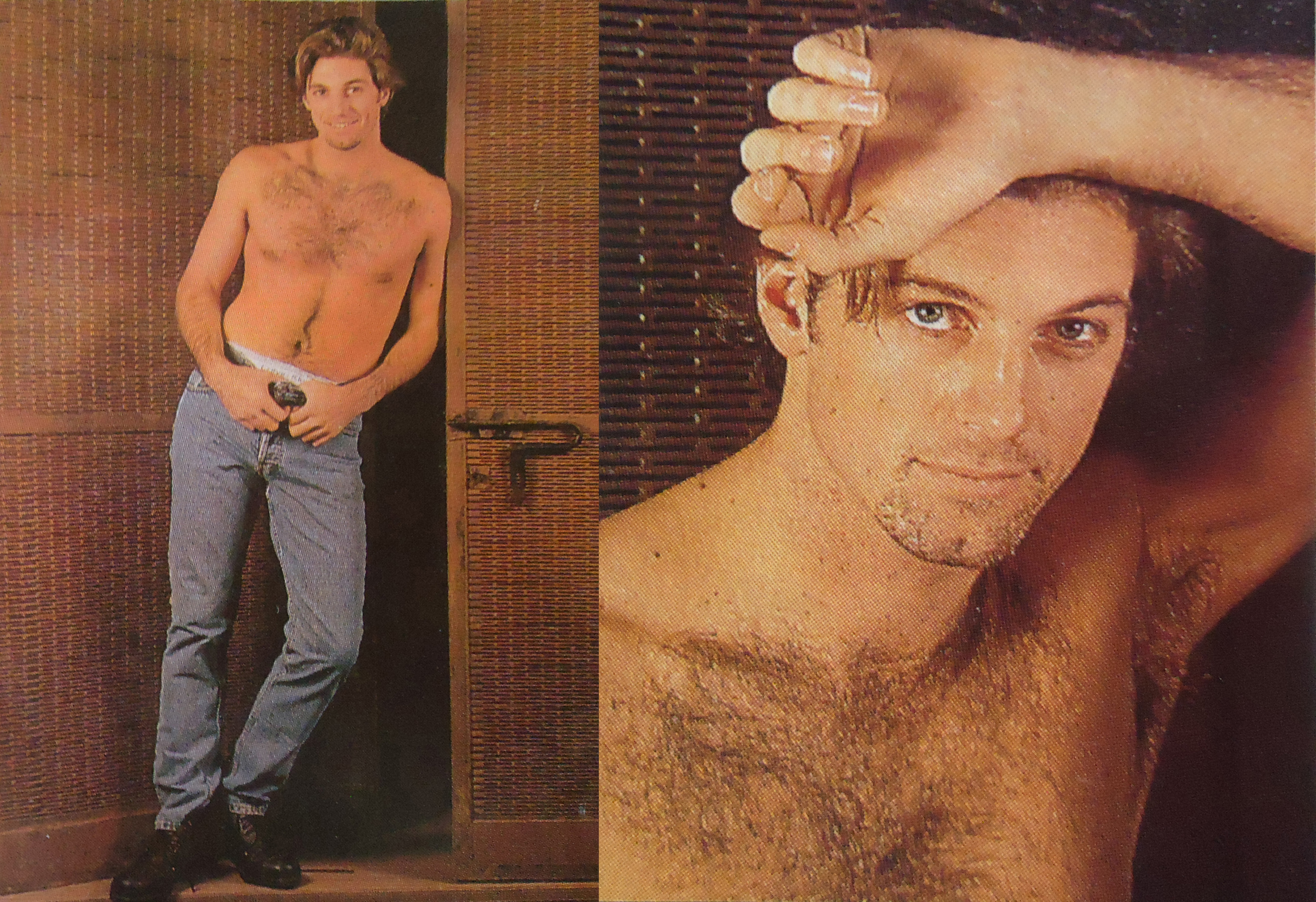 Horacio Cabak, modelo publicitario argentino, año 1989. Para una nota de Clarín Revista. Intenté volver a subir la imagen pero me fue imposible con la vieja forma.